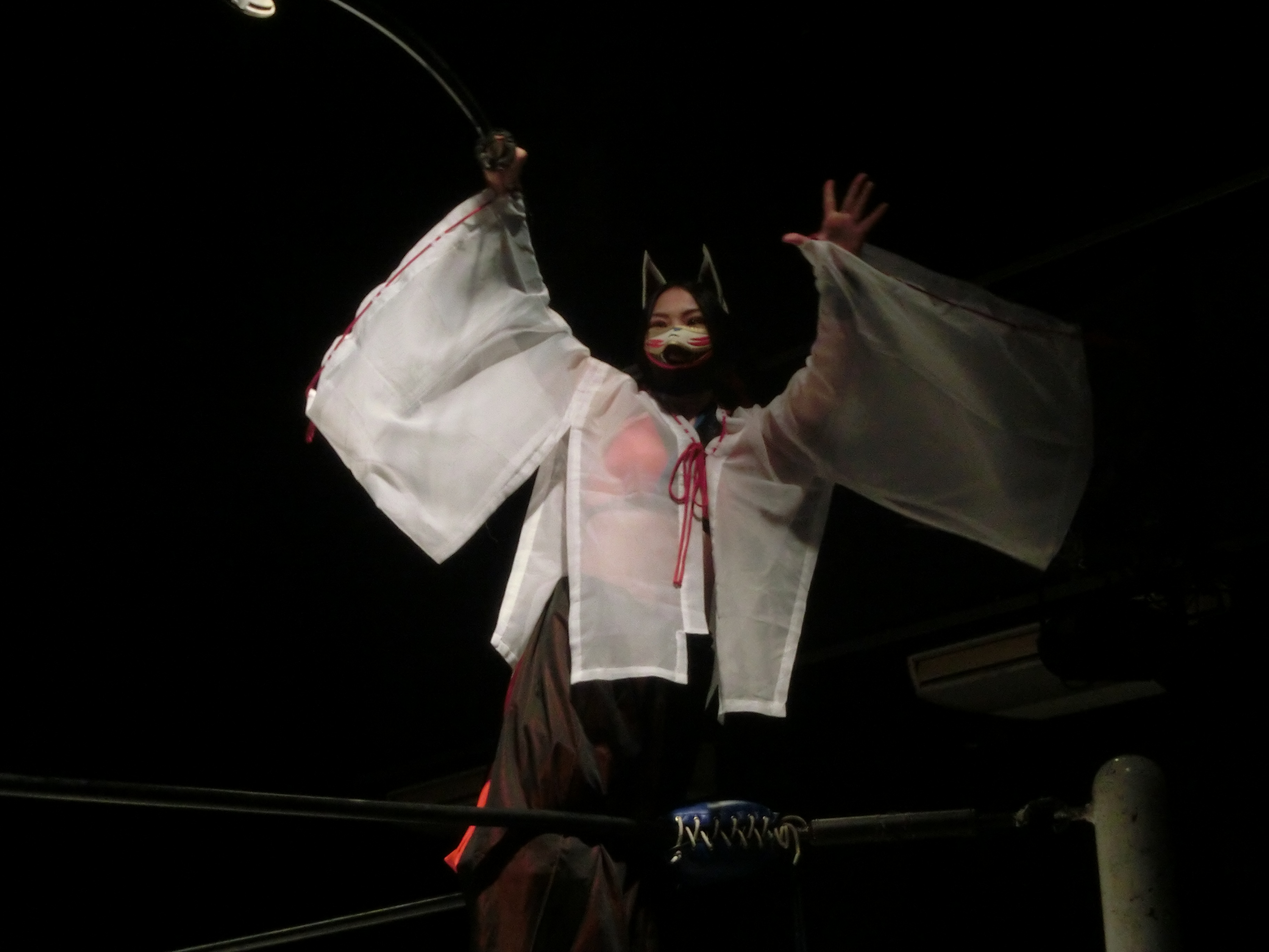 FUKUMEN-MANIA201802